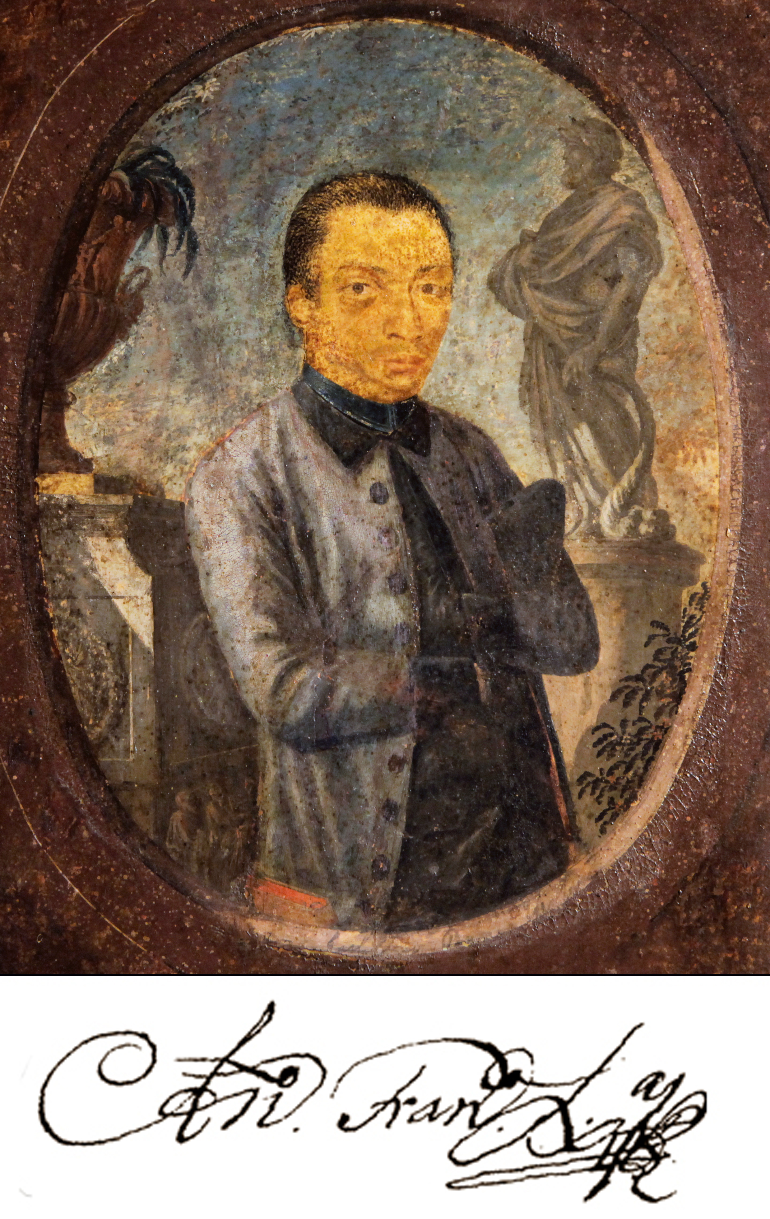 Suposto retrato de Aleijadinho